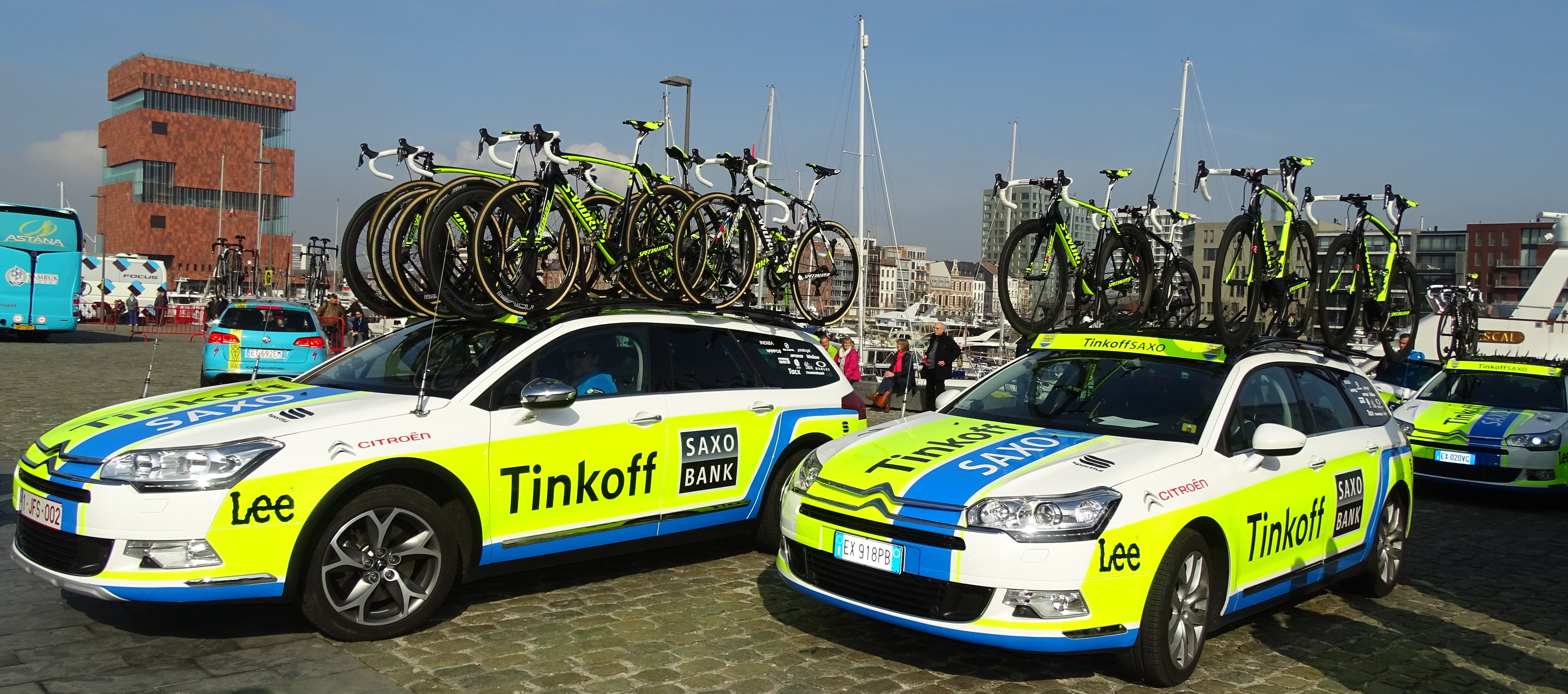 Reportage réalisé le mercredi 8 avril à l'occasion du départ du Grand Prix de l'Escaut 2015 à Anvers, Belgique.